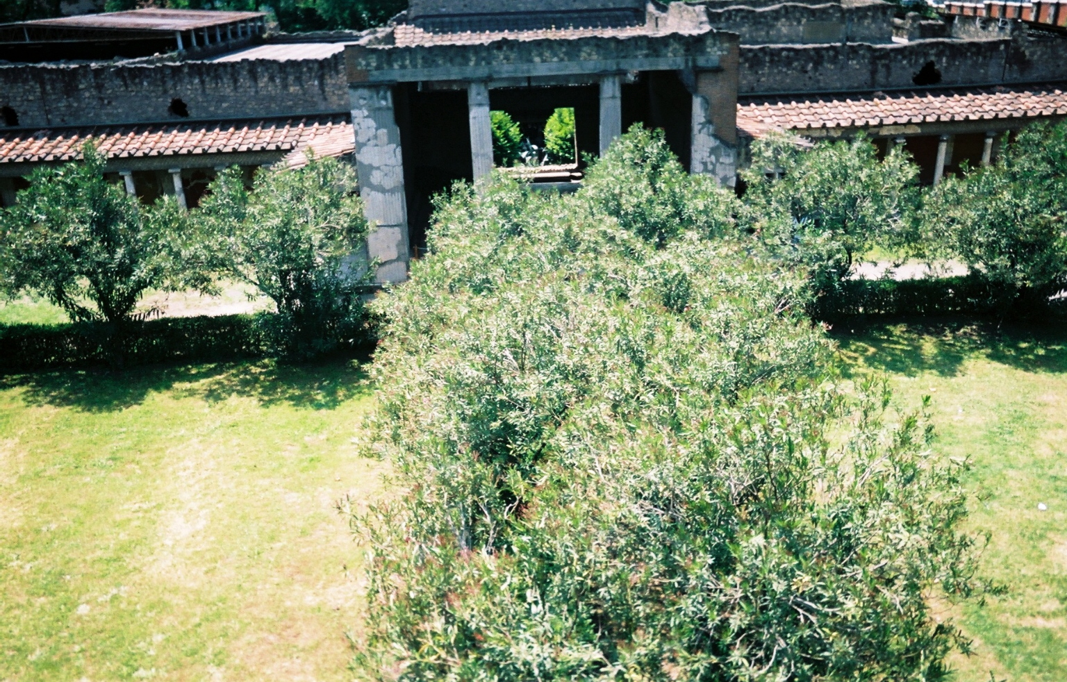 Accès à la villa de Poppée à Oplontis (Italie)